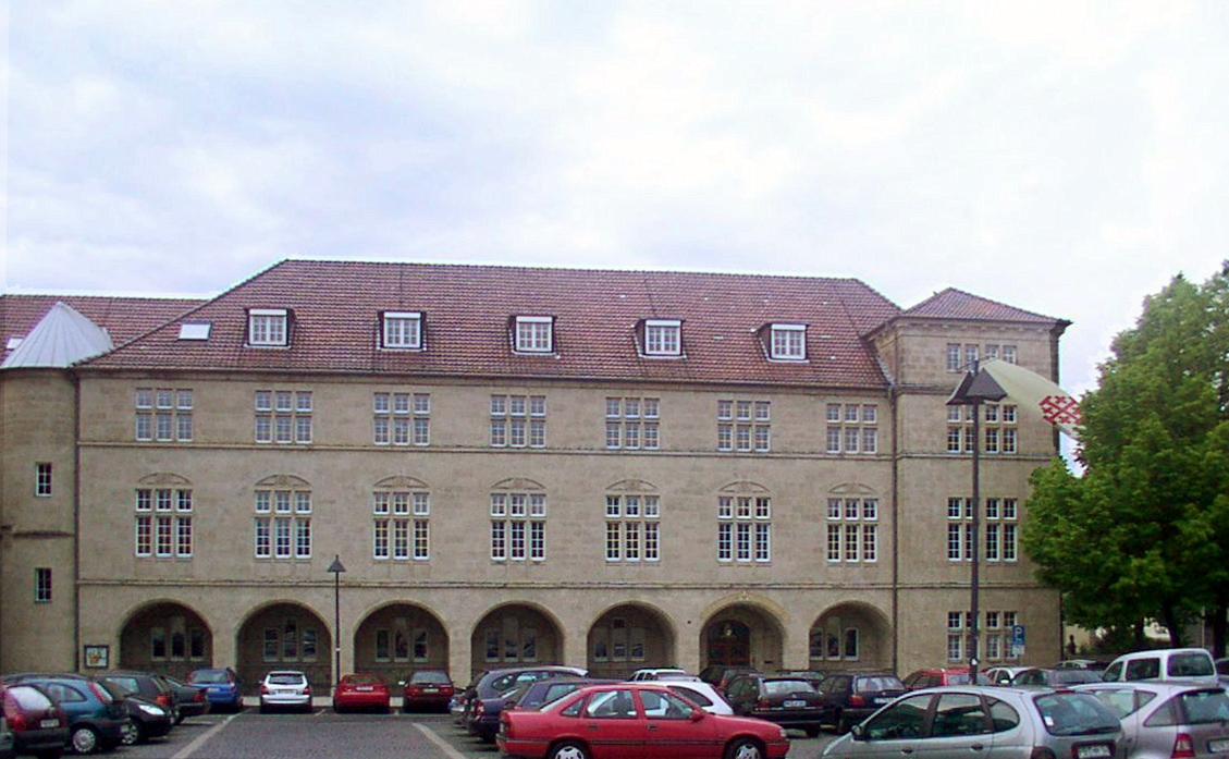 Paderborn: Generalvikariat im Mai 2005